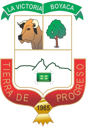 Escudo Municipio de La Victoria Boyacá